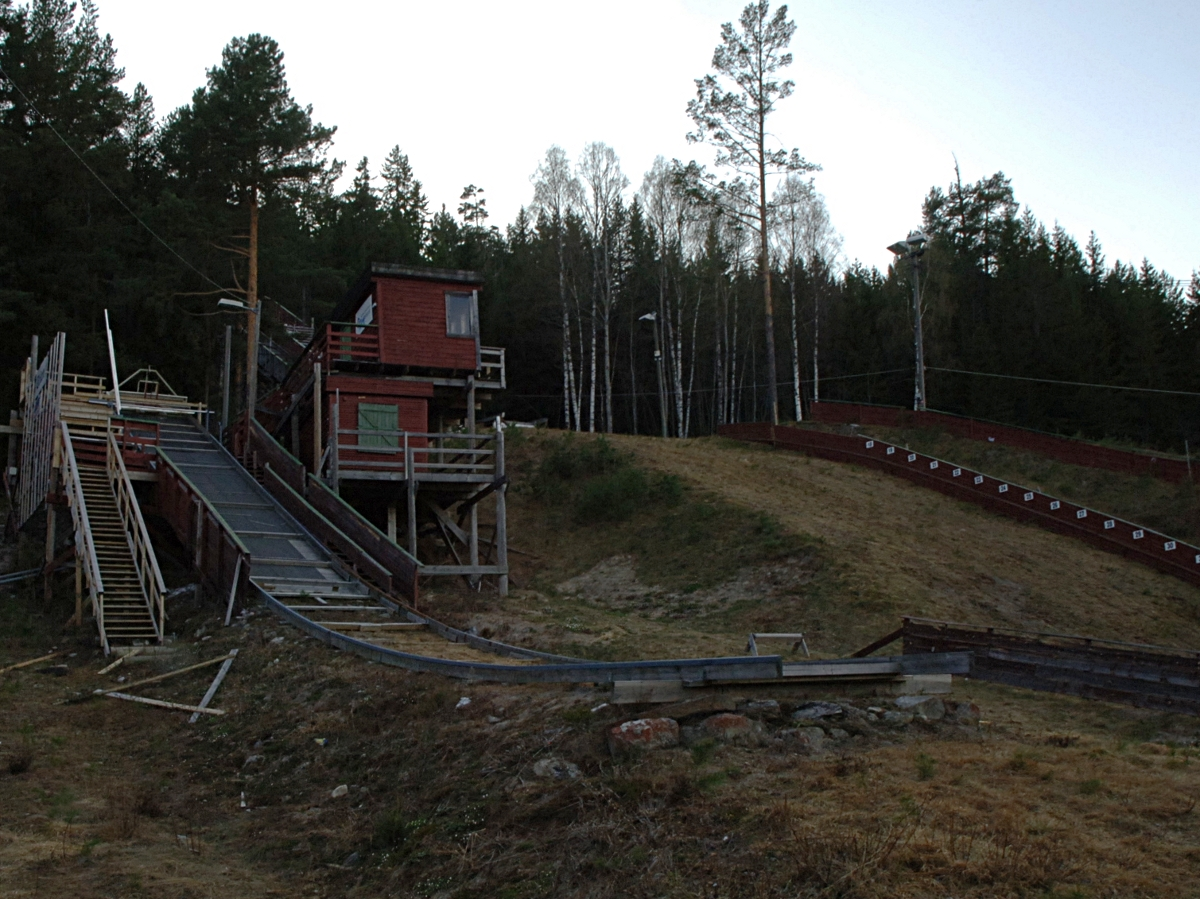 Tveitanbakken K15.